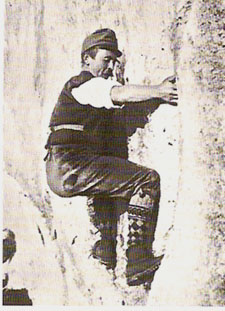 Hans Fiechtl (1883-1925)